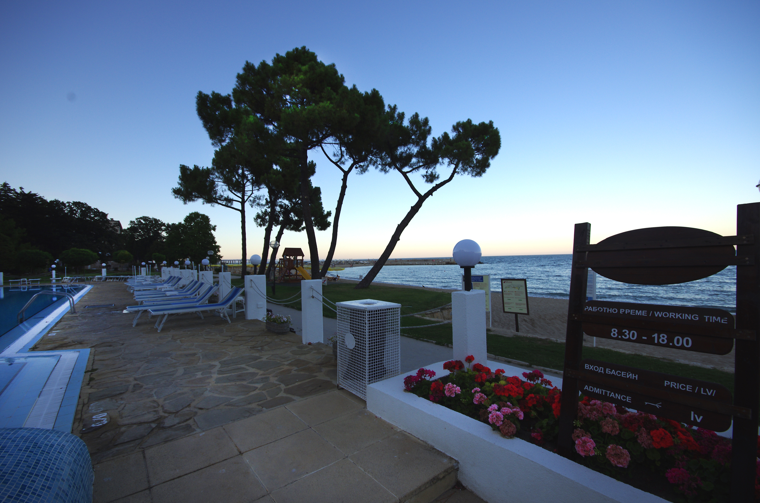 Золотые Пески вечером. Ривьера. Июль 2017 г.